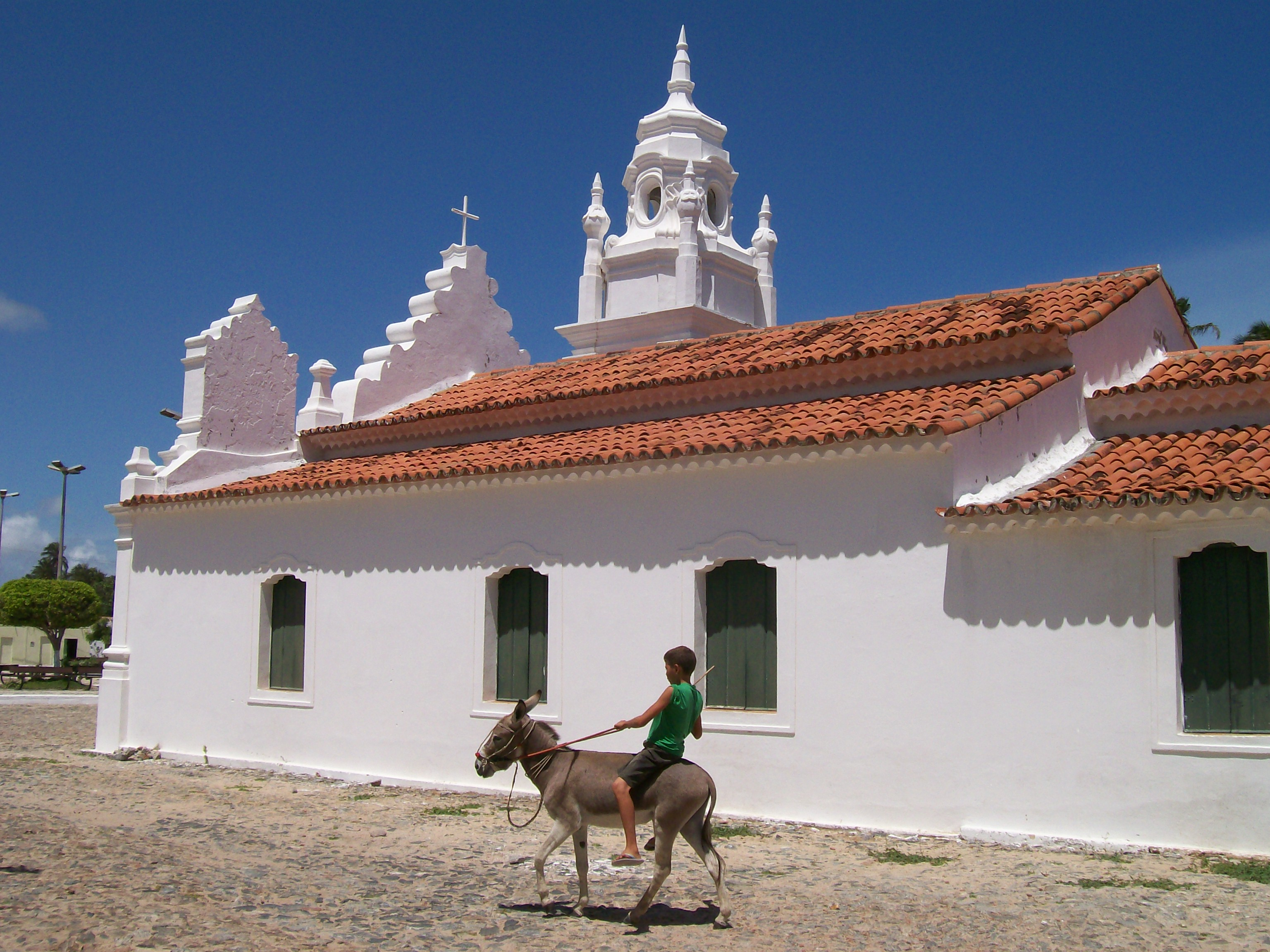 O TREMEMBÉ